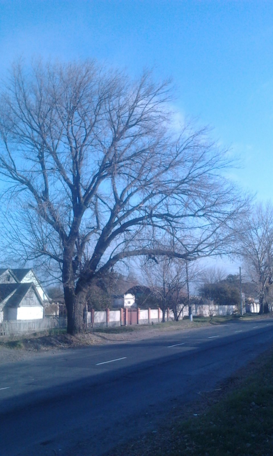 Ул. Февральская